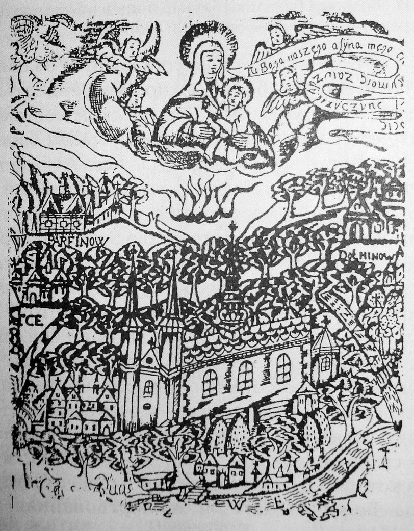 Беларуская (тарашкевіца): Будслаў (Budsłaŭ)